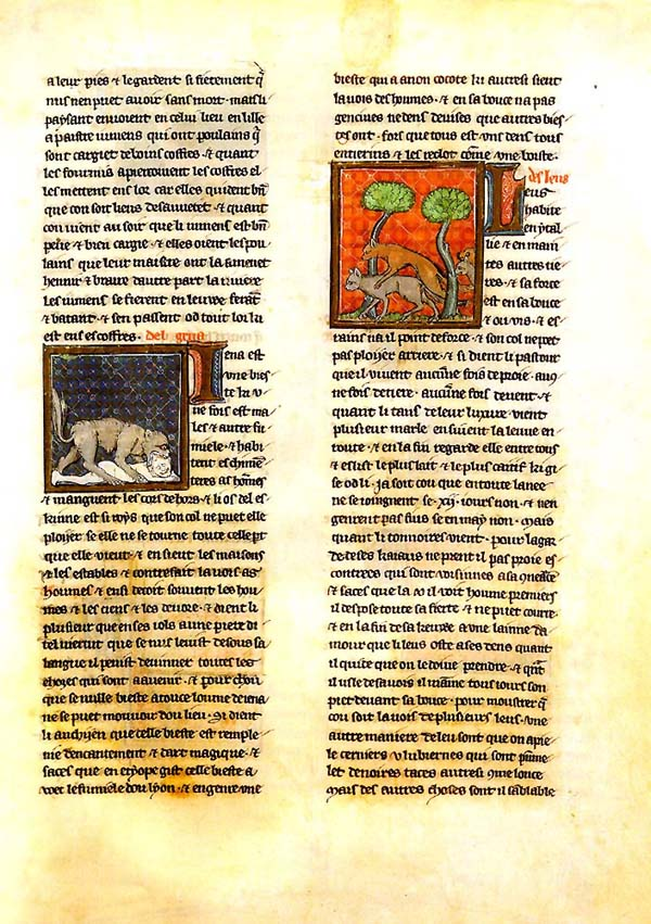 Manuscrito del Libro del tesoro